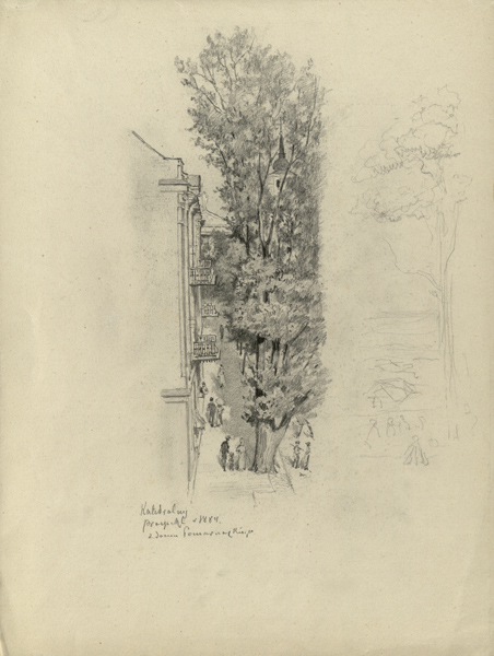 Беларуская (тарашкевіца): Вільня (Vilnia), праспэкт Юраўскі (praspekt Juraŭski)